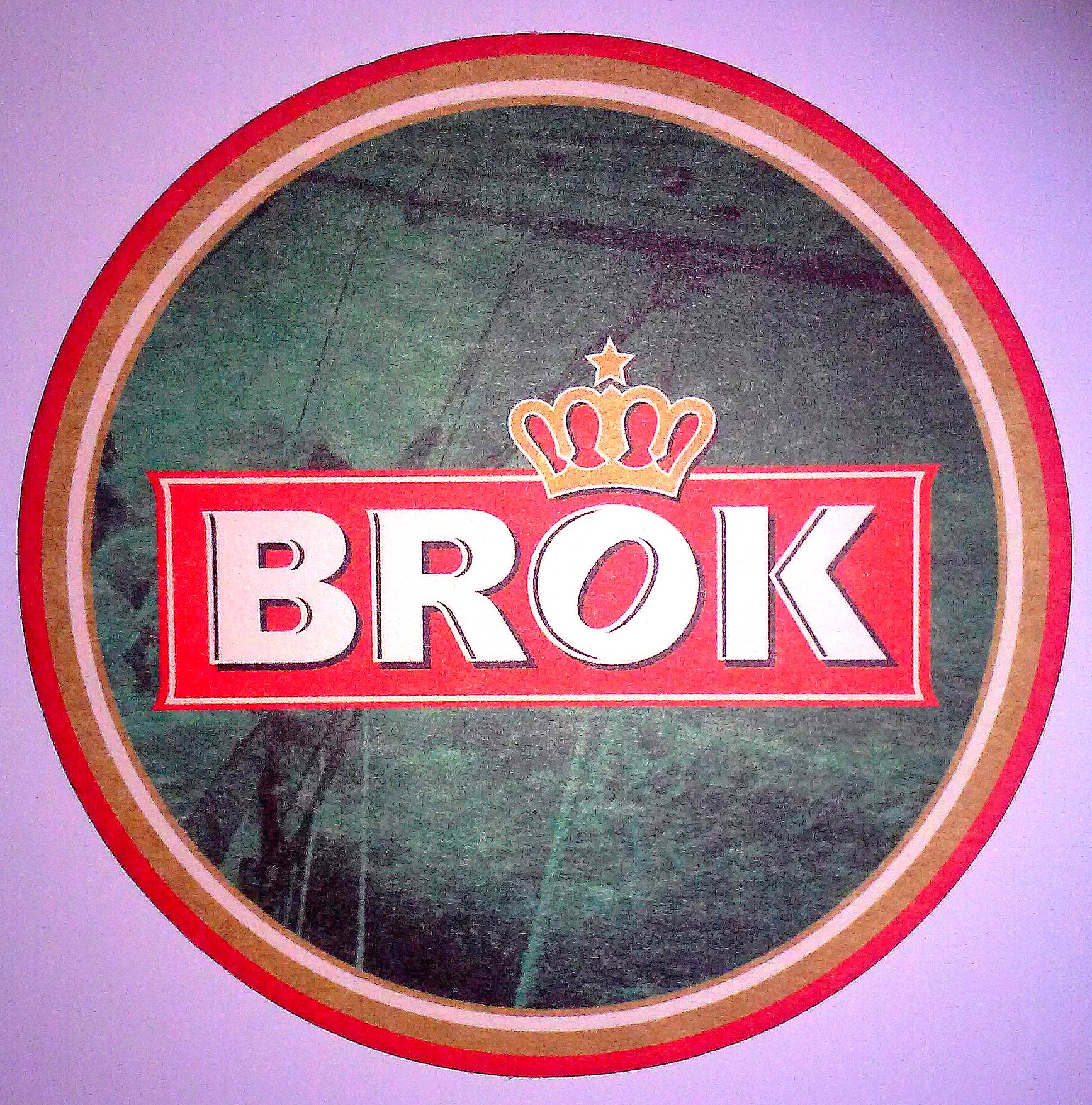 Podstawka pod piwo Brok